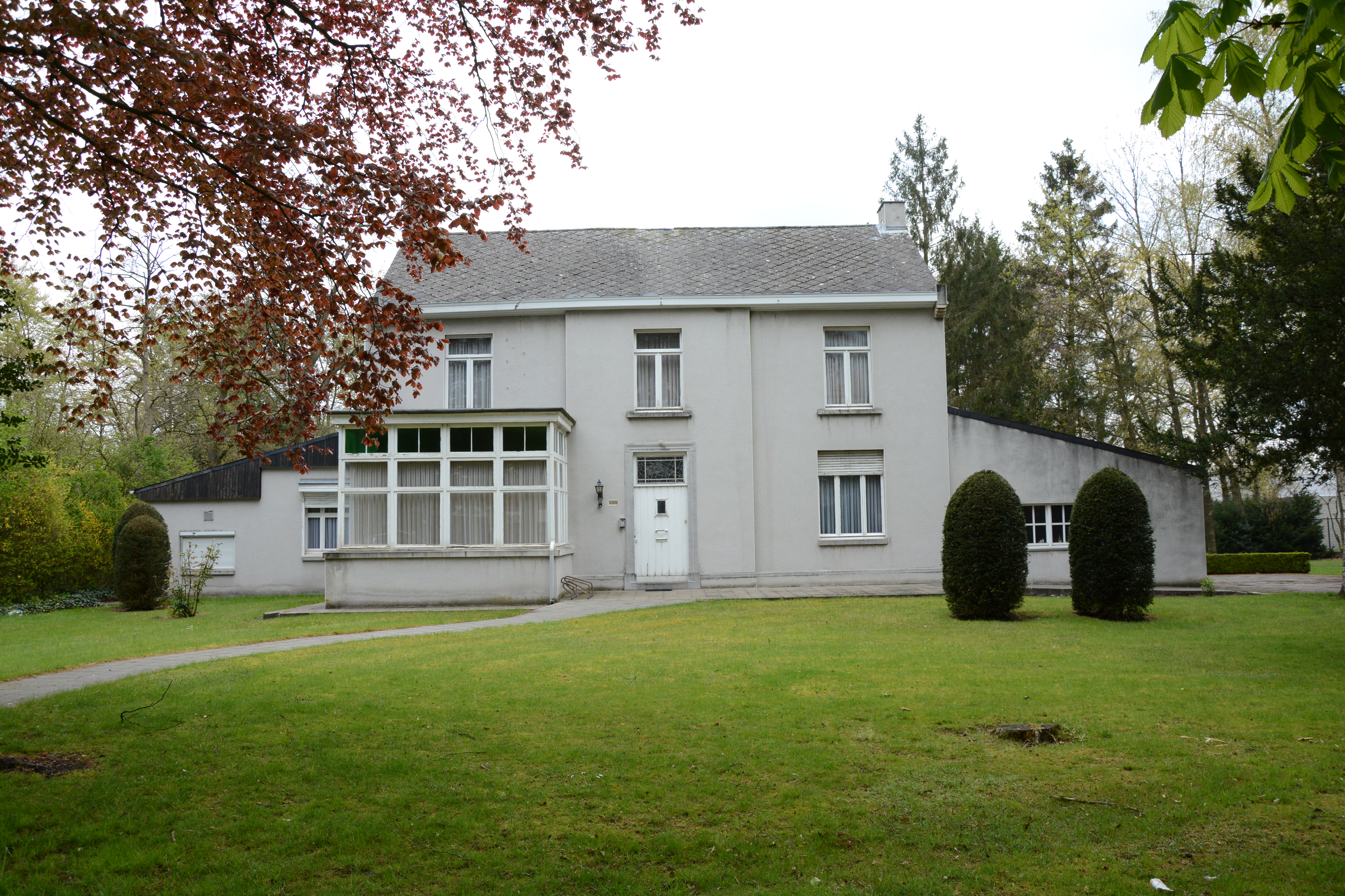 Pastorie, Kerkhovensesteenweg 424, Lommel